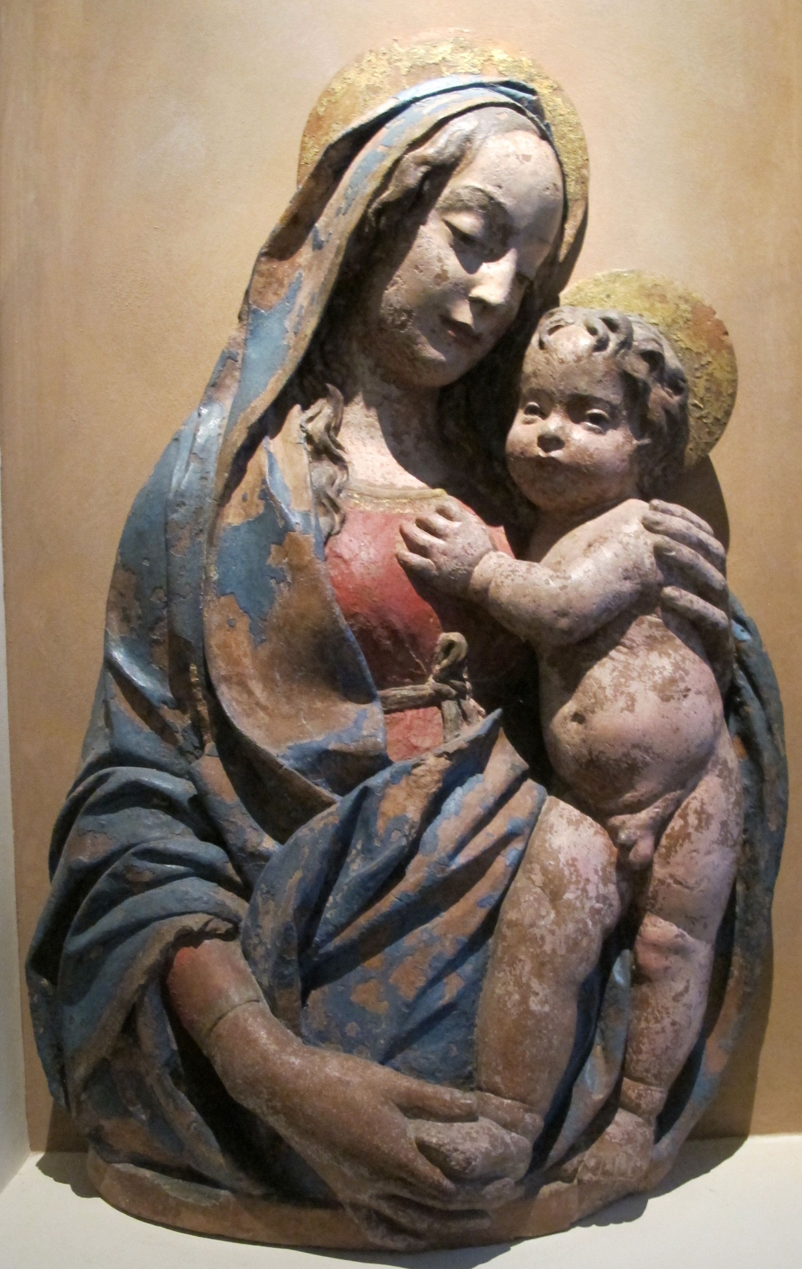 Museo nazionale di Villa Guinigi - MIBAC This is a photo of a monument which is part of cultural heritage of Italy.